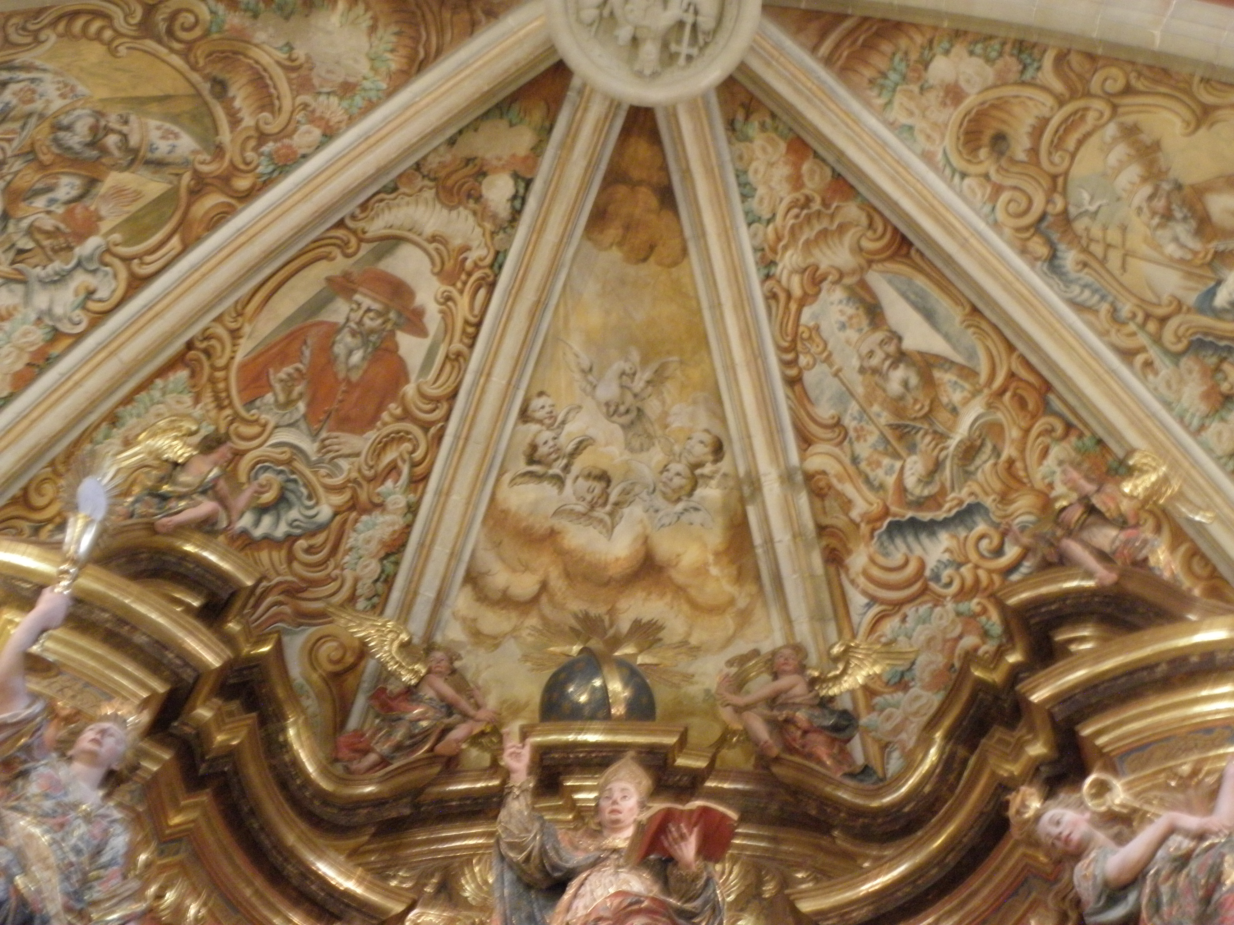 Interior de l'església del Santuari del Miracle (Riner, Solsonès)